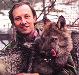 Nicolae Romulus Dărămuș cu un lup de la orfelinatul de pui de lup și urs pe care l-a adăpostit.